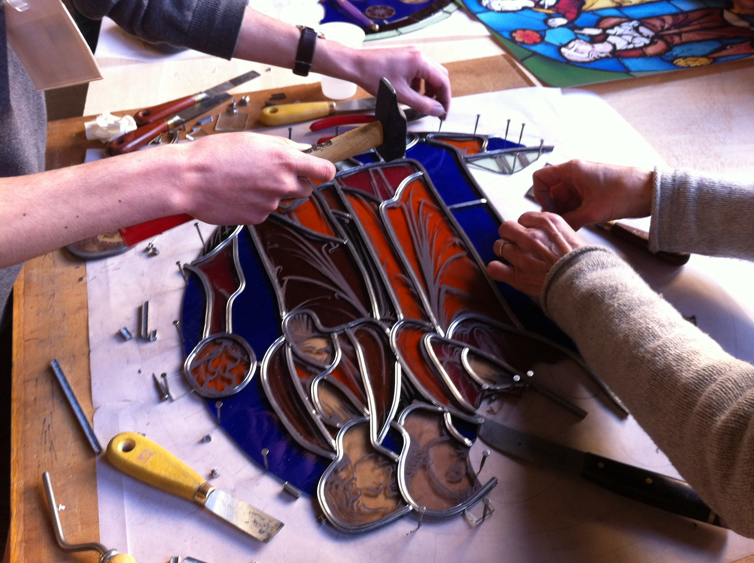 Dans le cadre des Journées européennes des Métiers d'Art et des dimanches étudiants organisés par le musée de Cluny, des élèves de l'ENSAAMA (l’École nationale supérieure des arts appliqués et métiers d'art à Paris), futurs peintres-verriers, reconstituent un atelier vitrail dans la cour du musée. .